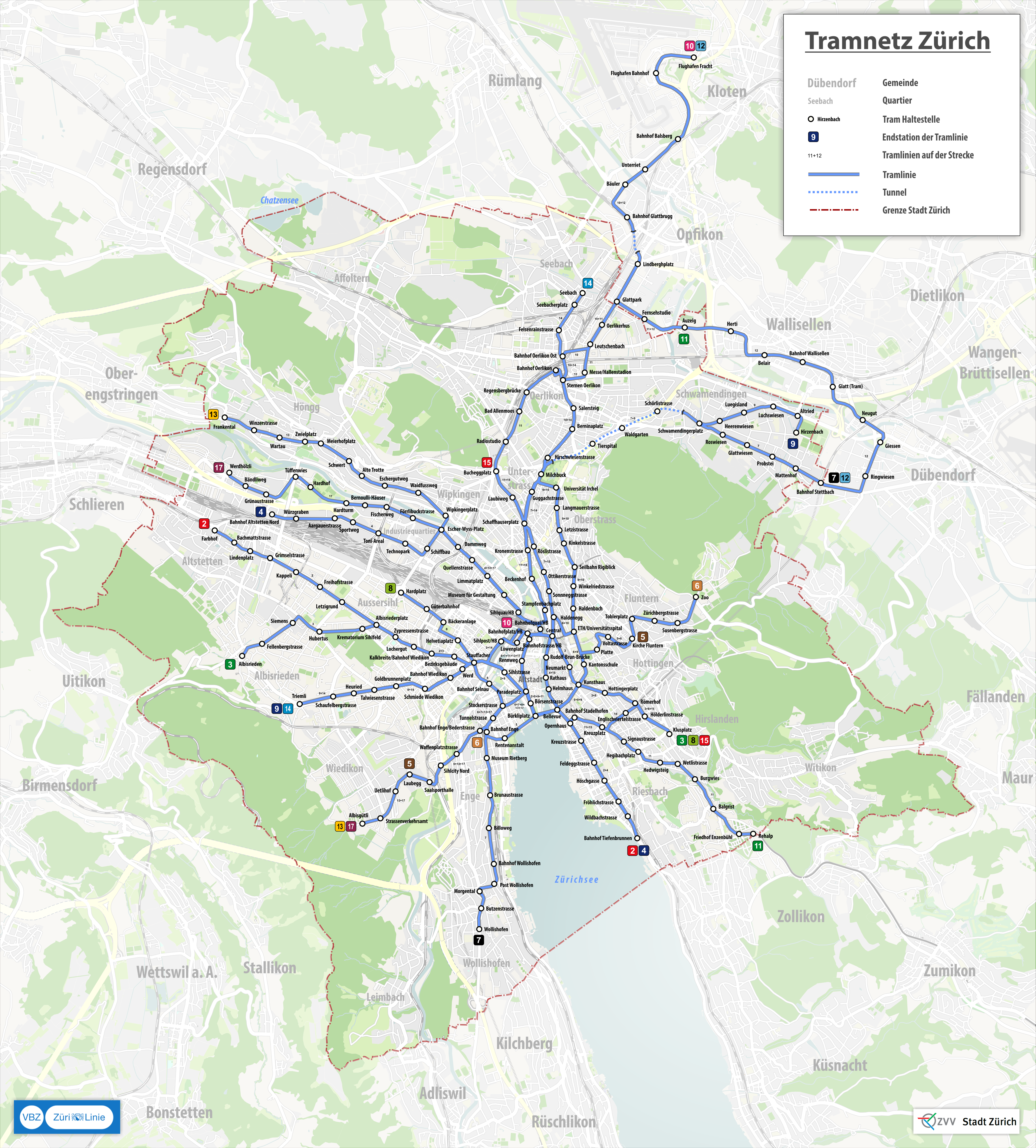 Tramnetz der Verkehrsbetriebe Zürich (VBZ), Stand 2014